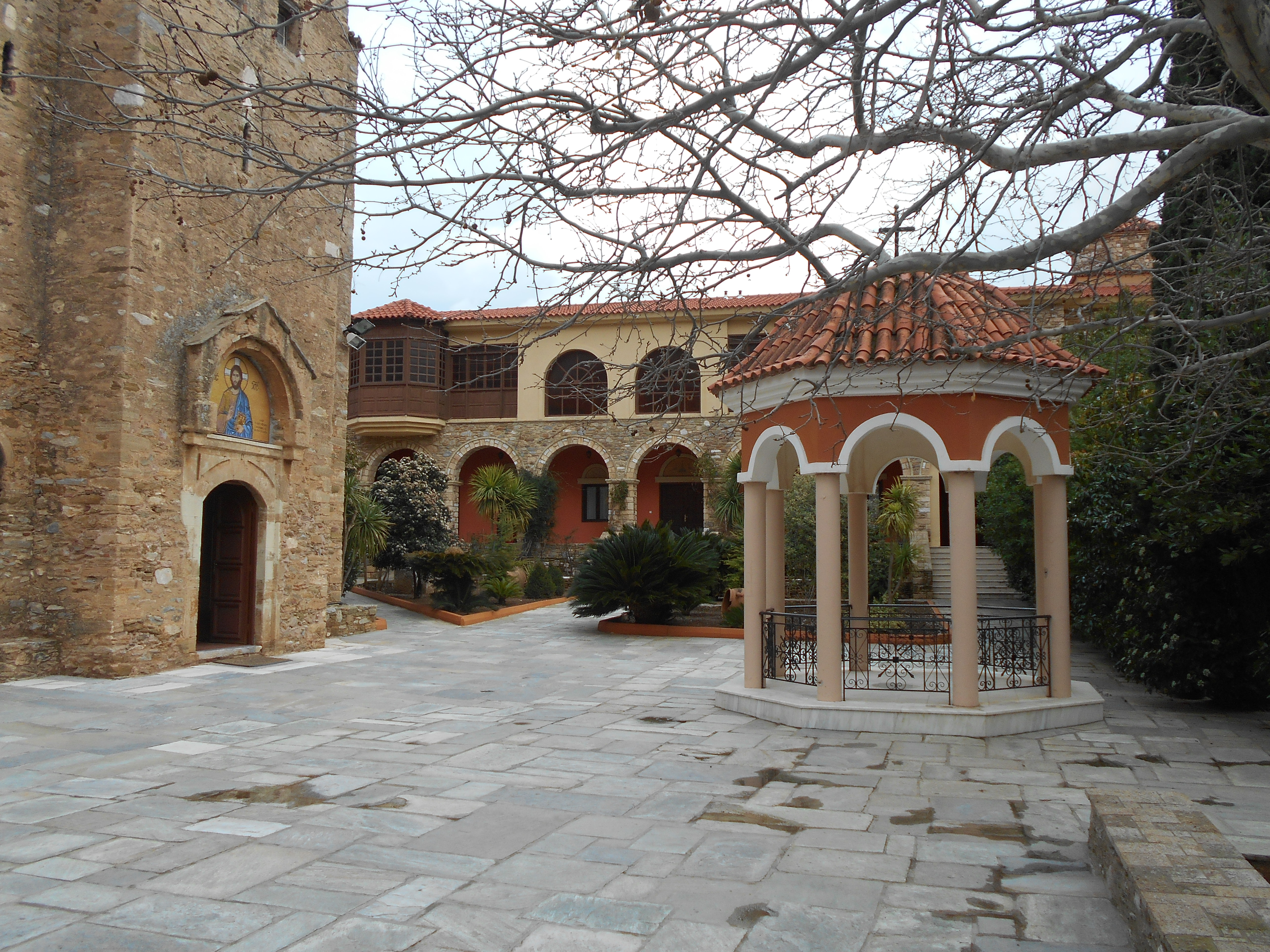 Μονή Νταού Πεντέλης«Μονή Νταού»